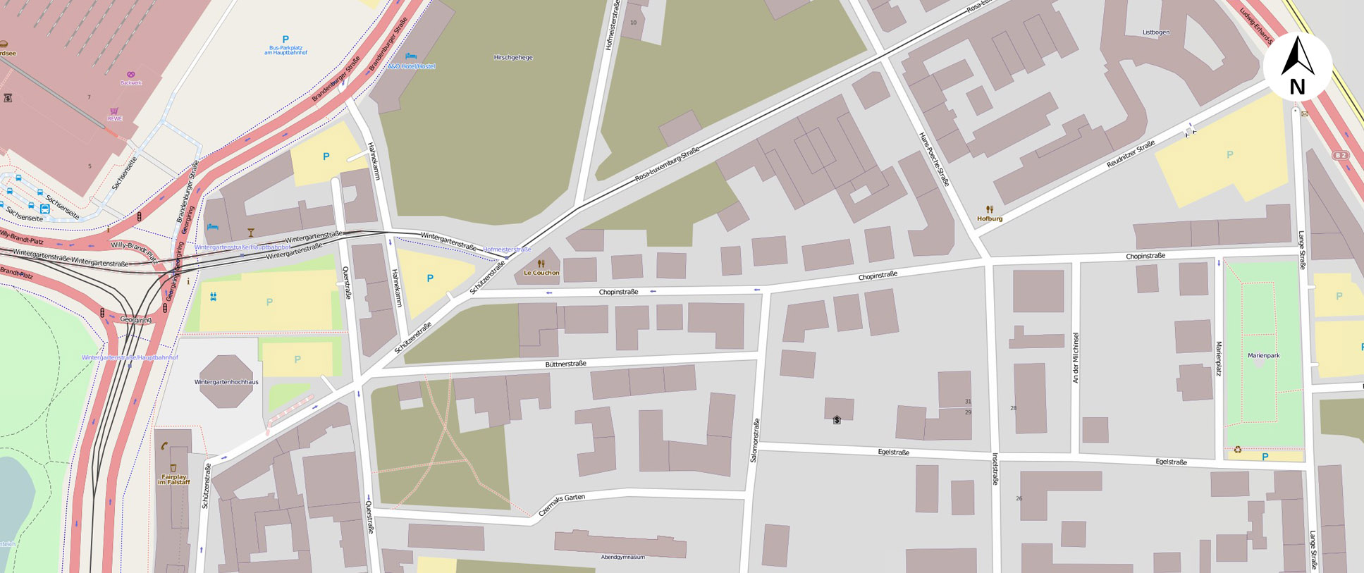 Gebiet der ehemaligen Milchinsel in Leipzig auf einem Plan aus dem Jahr 2011